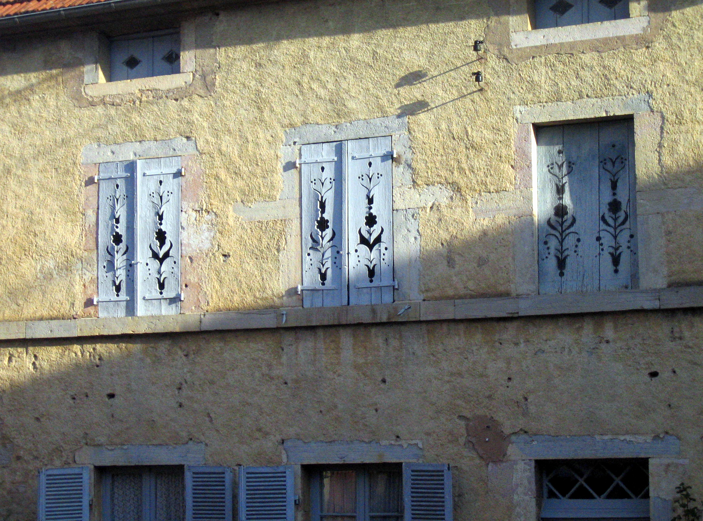 Fleurey-sur-Ouche (Côte-d'Or, France) - Volets aux motifs floraux élégants, dans la Grande rue du Bas. Il faut "noter" que seuls les 2 volets de gauche sont "évidés" par la décoration. A droite, le motif est peint au pochoir.